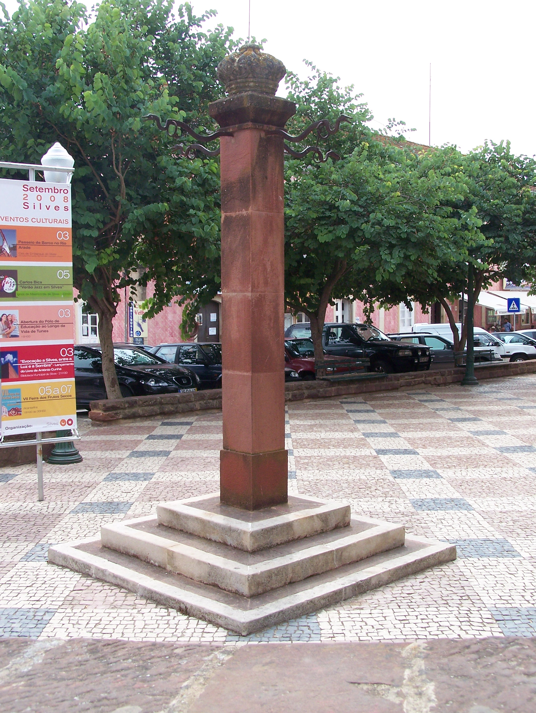 Pelourinho de Silves